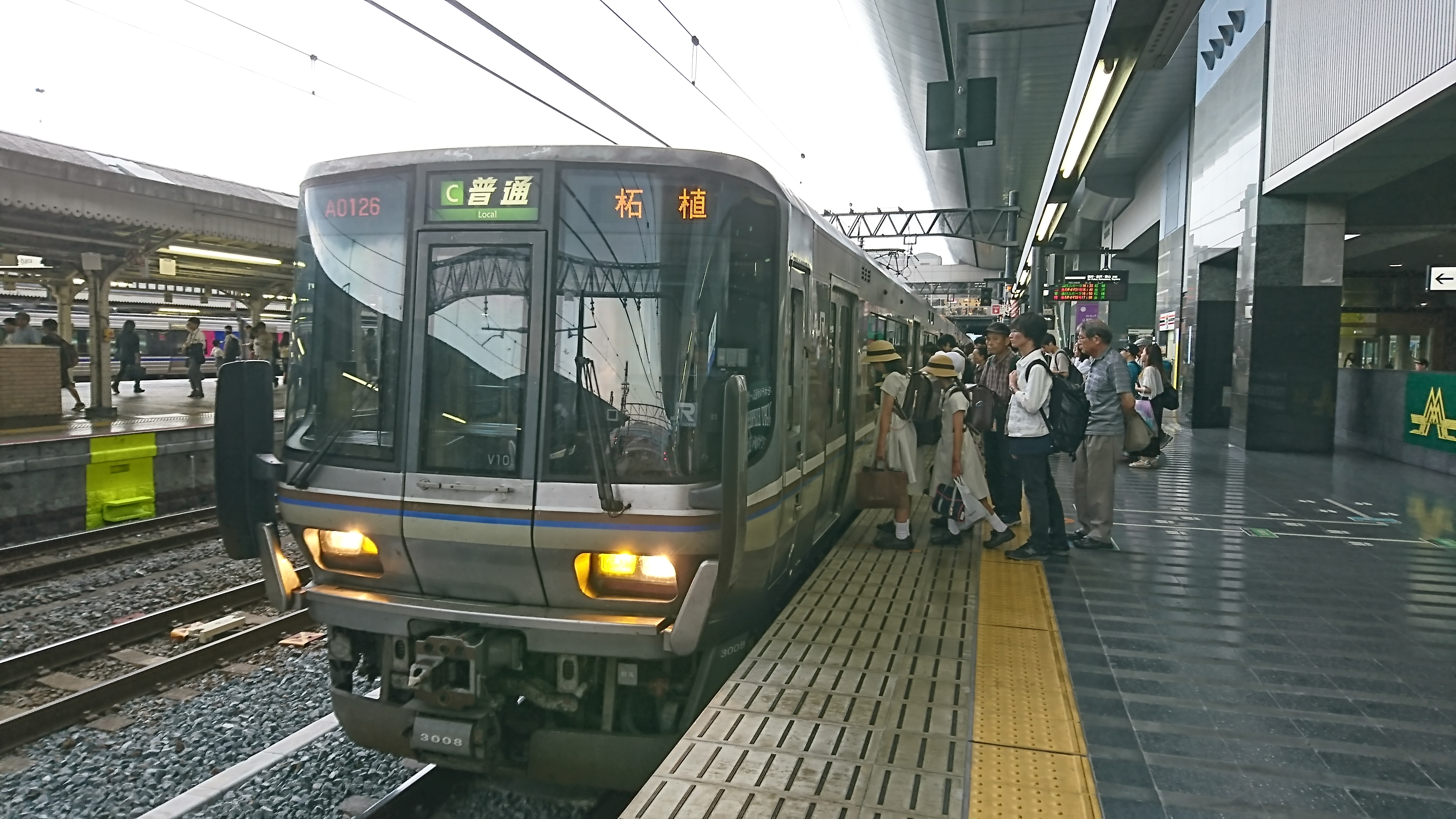 223系 京都駅にて